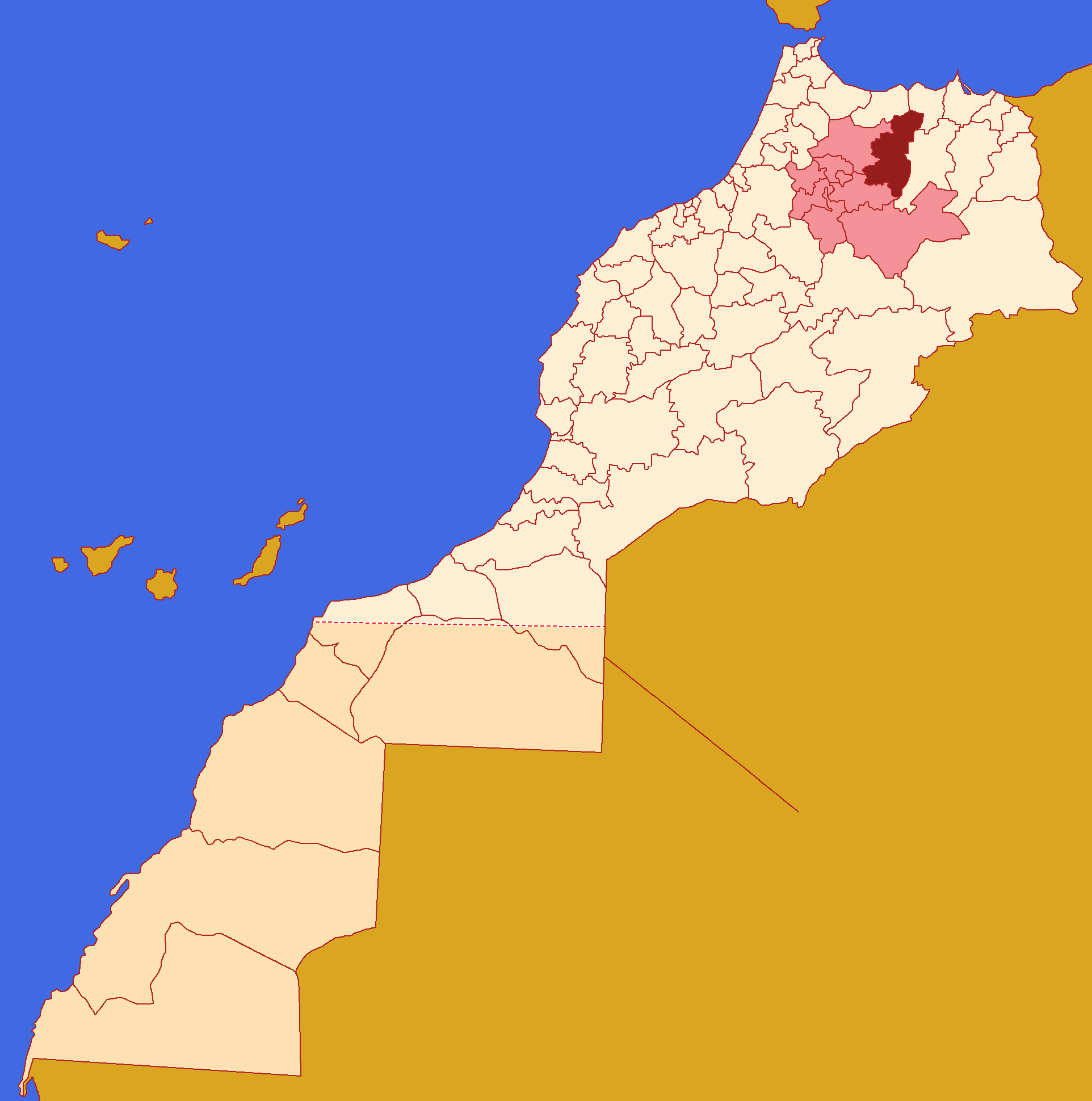 Localização da província de Taza, dentro da região de Fez-Meknès, dentro de Marrocos, conforme reforma administrativa de 2015